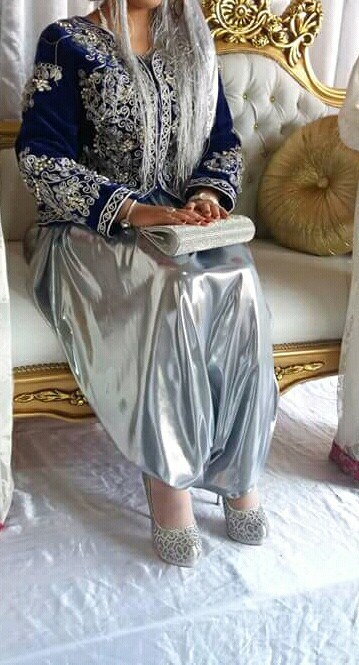 karakou tradition algérien